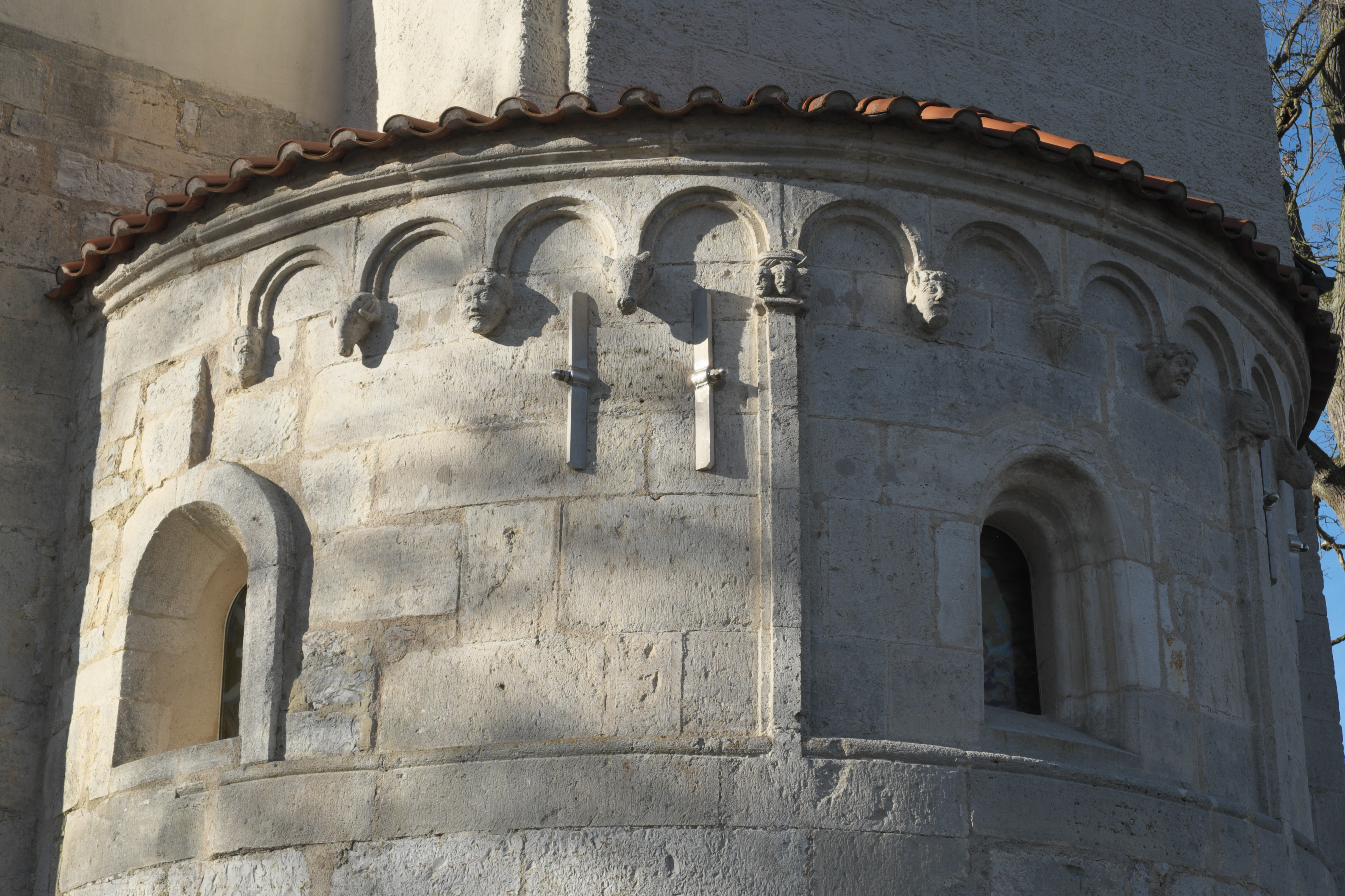 Katholische Pfarrkirche St. Ulrich in Ainau (Geisenfeld) im Landkreis Pfaffenhofen an der Ilm (Bayern/Deutschland), Apsis